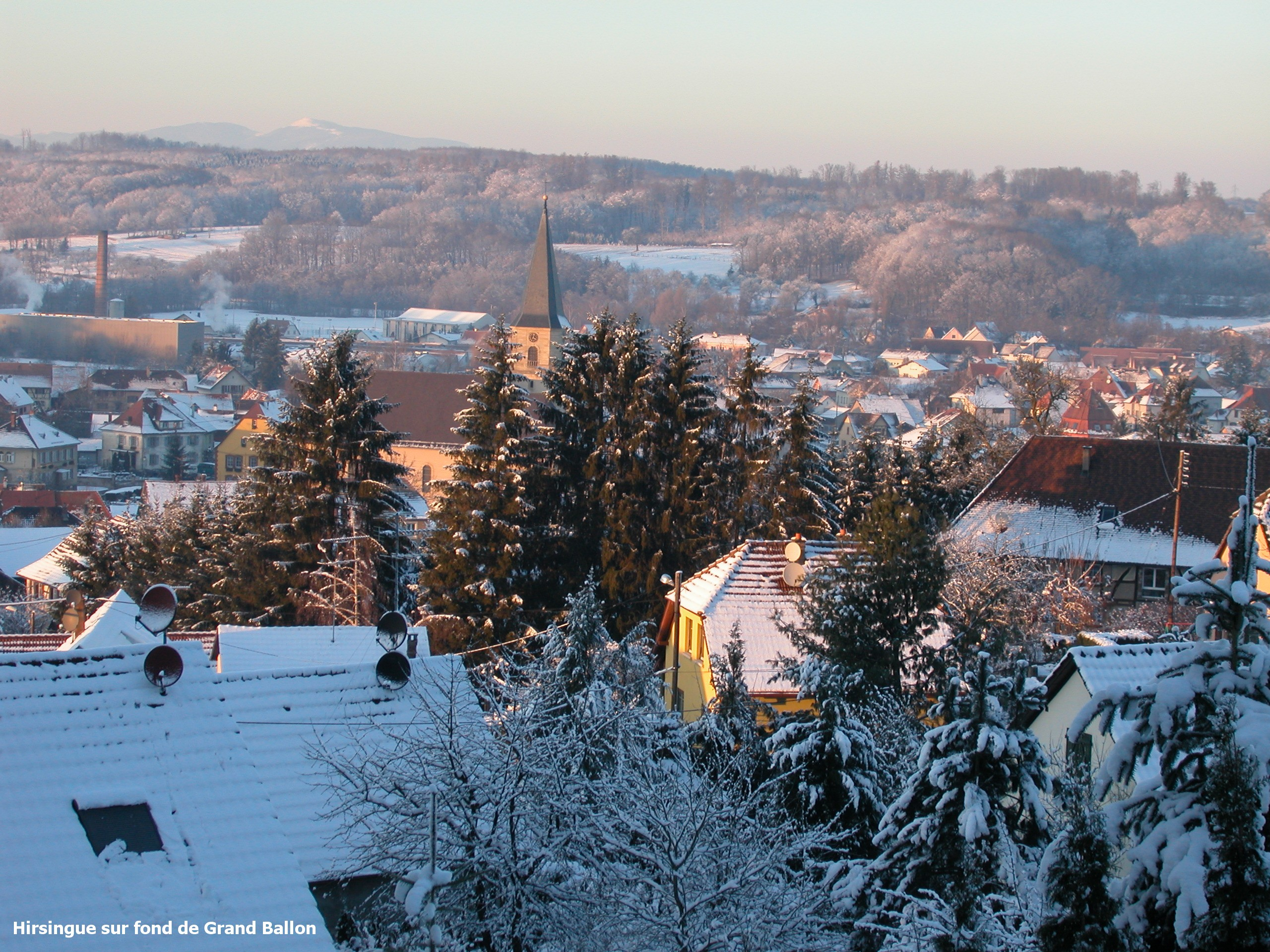 Vue du village depuis le chalet du Banholz